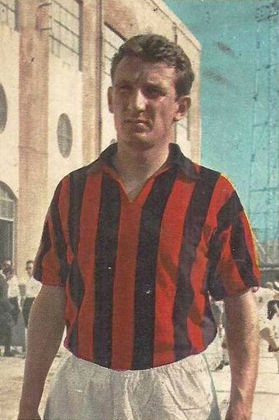 calciatore e allenatore di calcio italiano